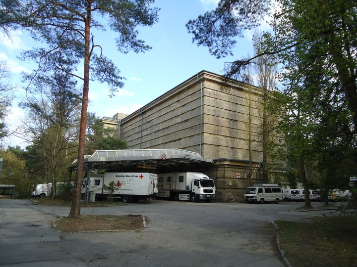 Bunker der Reichsluftschutzschule und späteren Lungenklinik Heckeshorn